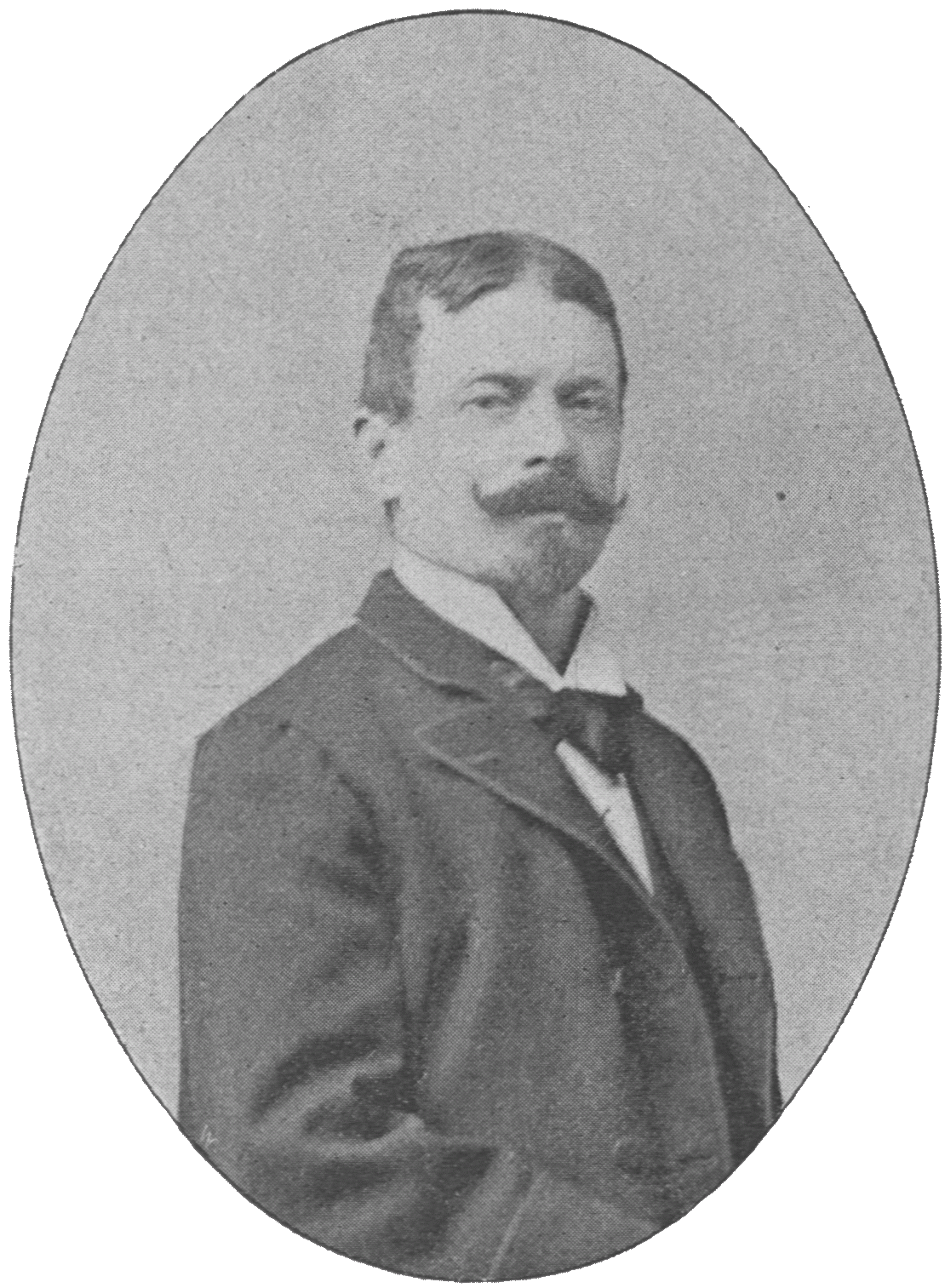 Michael Ogertschnig (Ogertschnigg ?, 1846 - between 1901 and 1941), Austrian painter